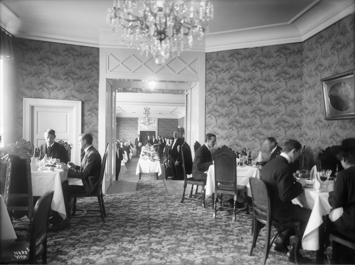 Parkkafeen i Huitfeldts gate 1 (senere omregulert til Drammensveien 10 og så Henrik Ibsens gate 36).